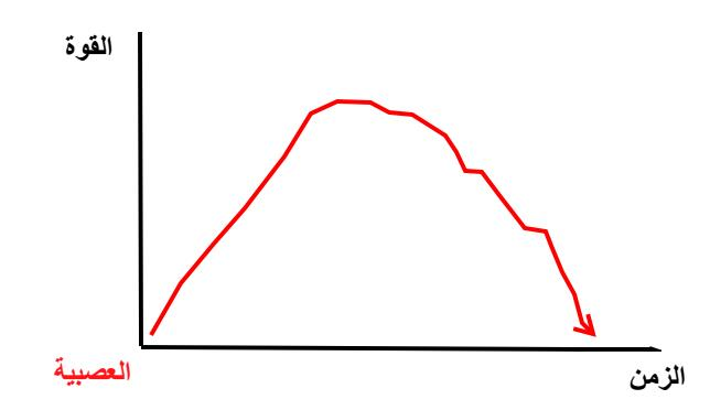 مبيان يبين تطور العصبية مع مرور الزمن وتعاقب الأجيال حيت تنخفض الروابط القبلية و الأسرية و حماسة الولاء مع أنغماس الحكام و المحيطين بهم في رفه العيش و في النهاية تنهار الدولة أو تكون فريسة لدولة أخرى أو أي غزو أجنبي